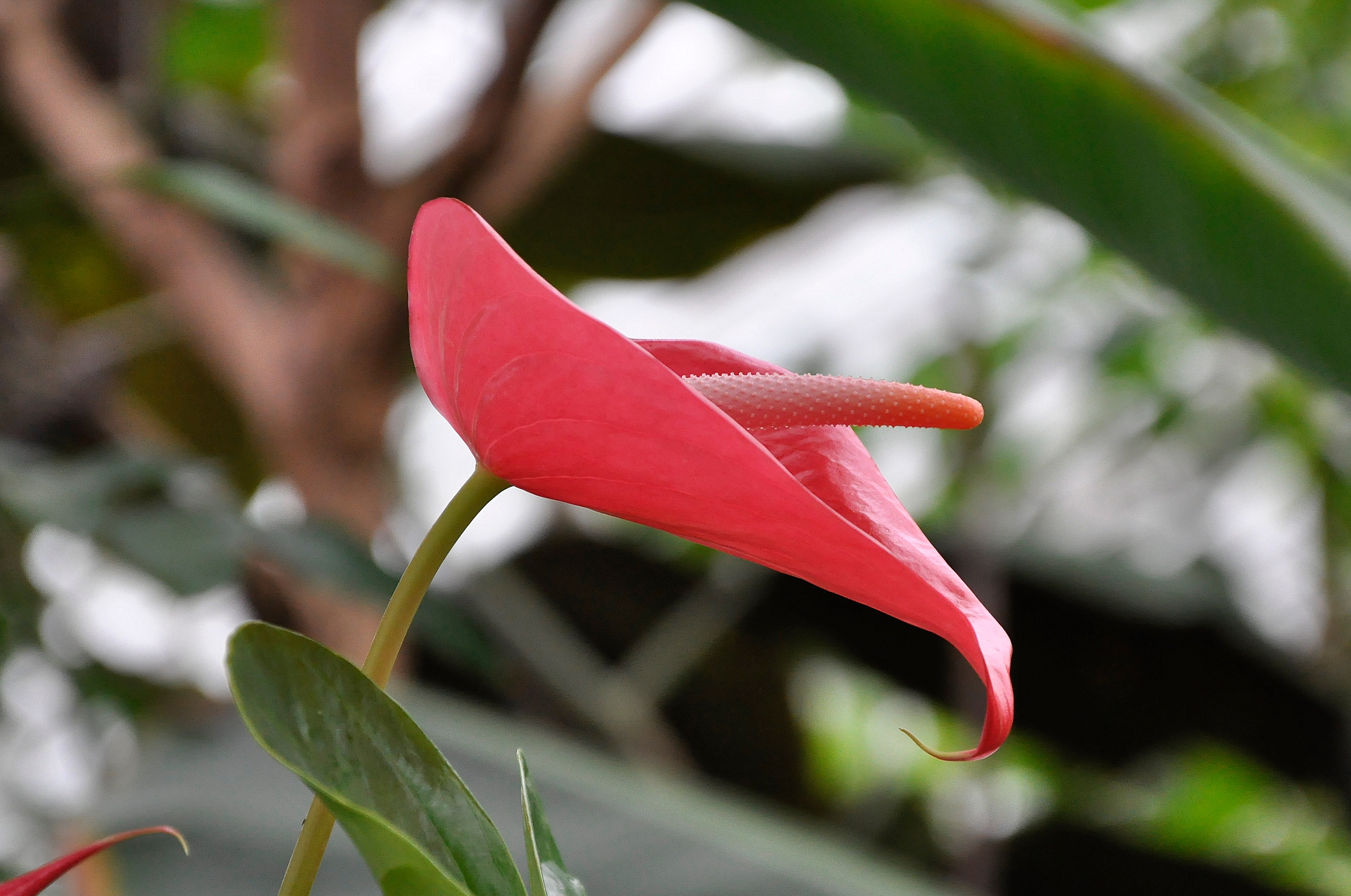 Anthurium (andreanum_hybride) in de Nationale Plantentuin van België te Meise